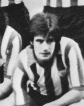 Collectie / Archief : Fotocollectie Anefo Reportage / Serie : Halve finale UEFA Cup RWD Molenbeek - Athletic de Bilbao (1977) Beschrijving : Elftalfoto Athletic de Bilbao (archief) Datum : 4 april 1977 Locatie : Bilbao, Spanje Trefwoorden : Europacup, UEFA Cup, voetbal Fotograaf : [onbekend] Auteursrechthebbende : Nationaal Archief Materiaalsoort : Negatief (zwart/wit) Nummer archiefinventaris : bekijk toegang 2.24.01.04 Bestanddeelnummer : 929-1073